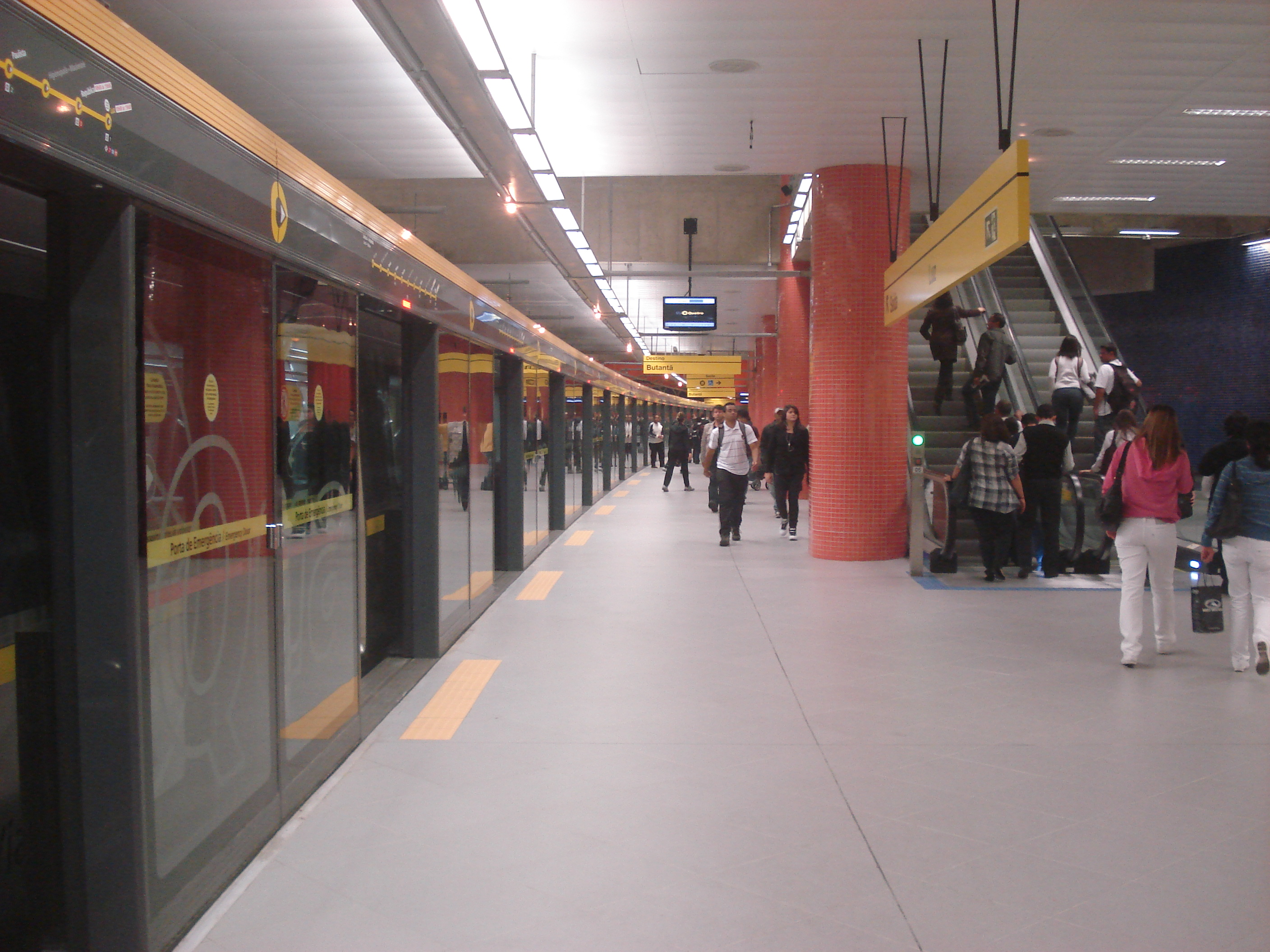 Plataforma da Estação Luz da Linha 4 - Amarela do Metrô de São Paulo.